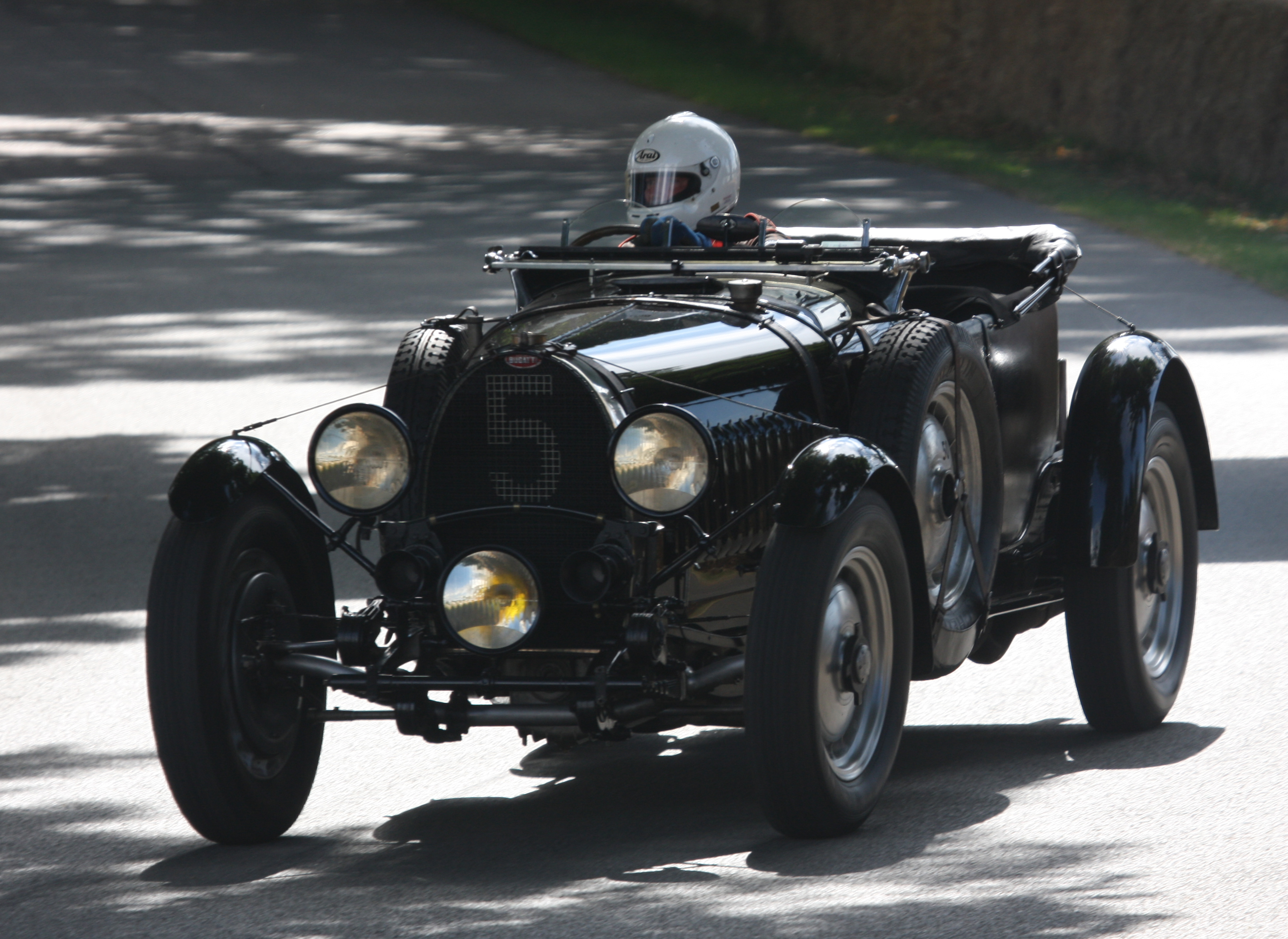 Goodwood 2009